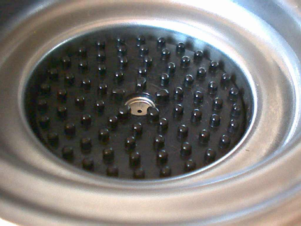 schuimvormend gaatje onderin de padhouder